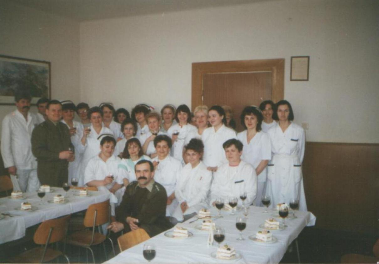 Personel medyczny 45 Batalionu Medycznego na spotkaniu z dowództwem z okazji Dnia Pracownika Służby Zdrowia